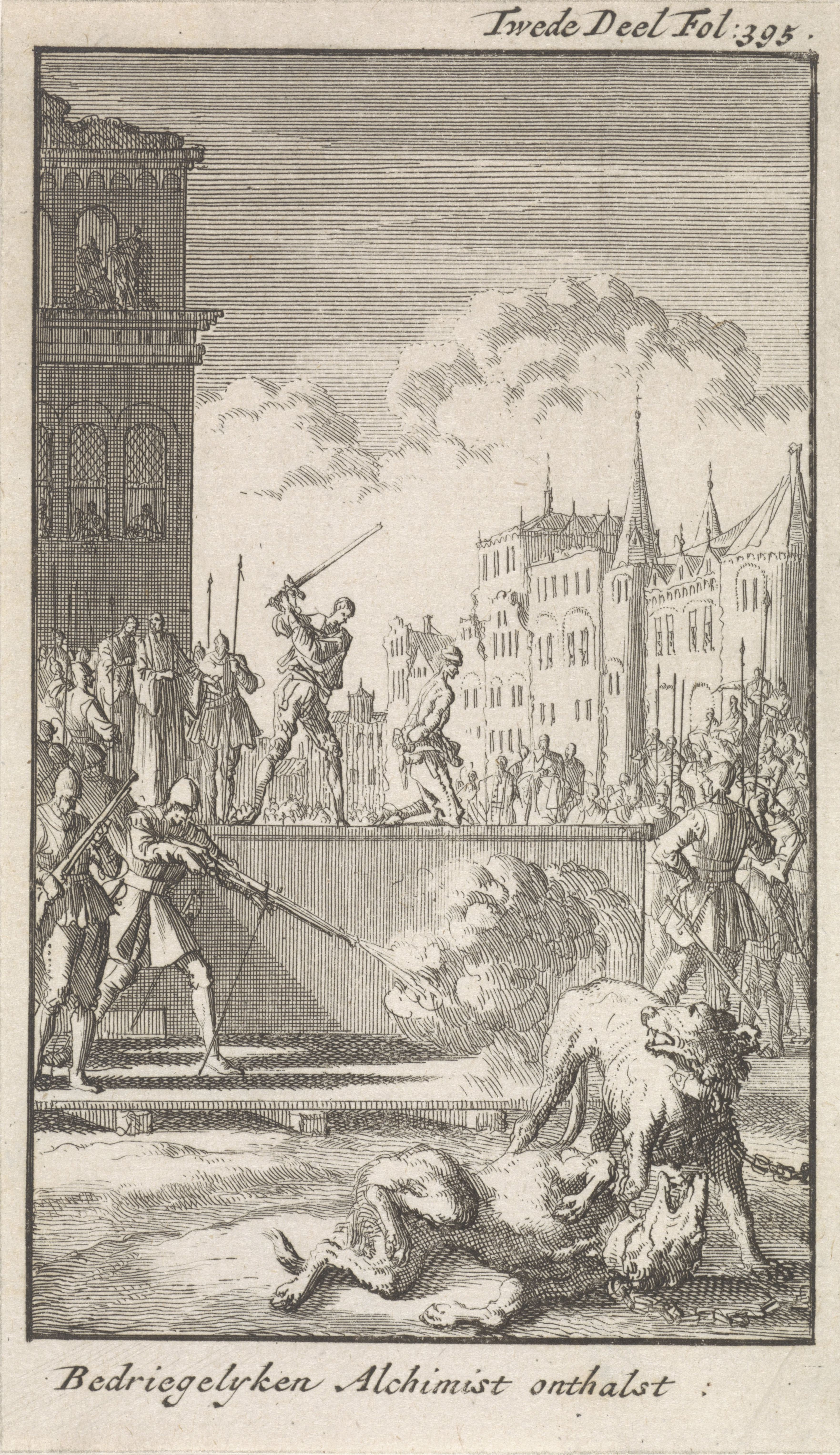 Execution de Bragadino et ses deux chiens